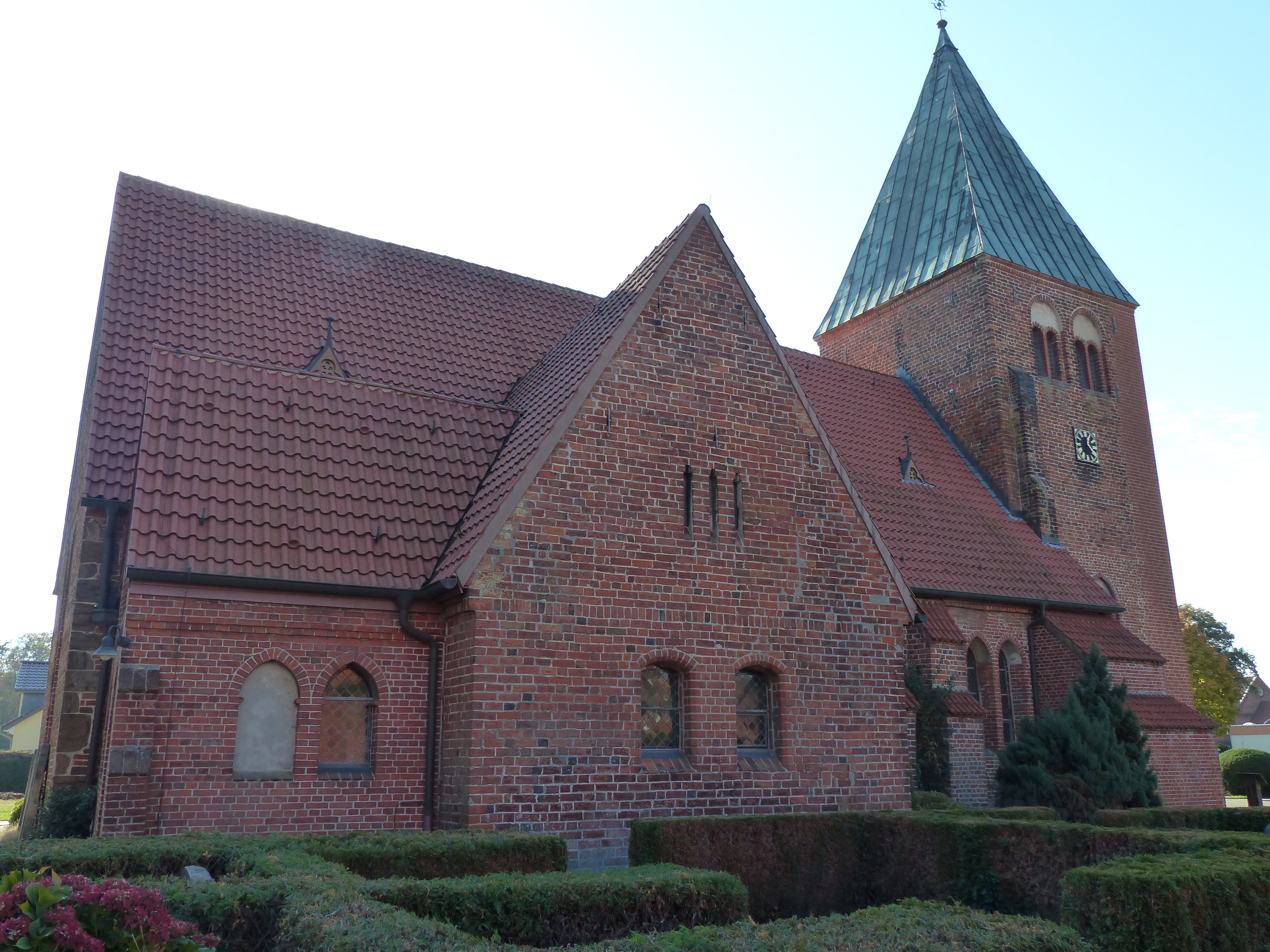 Nordseite der Andreaskirche in Riede